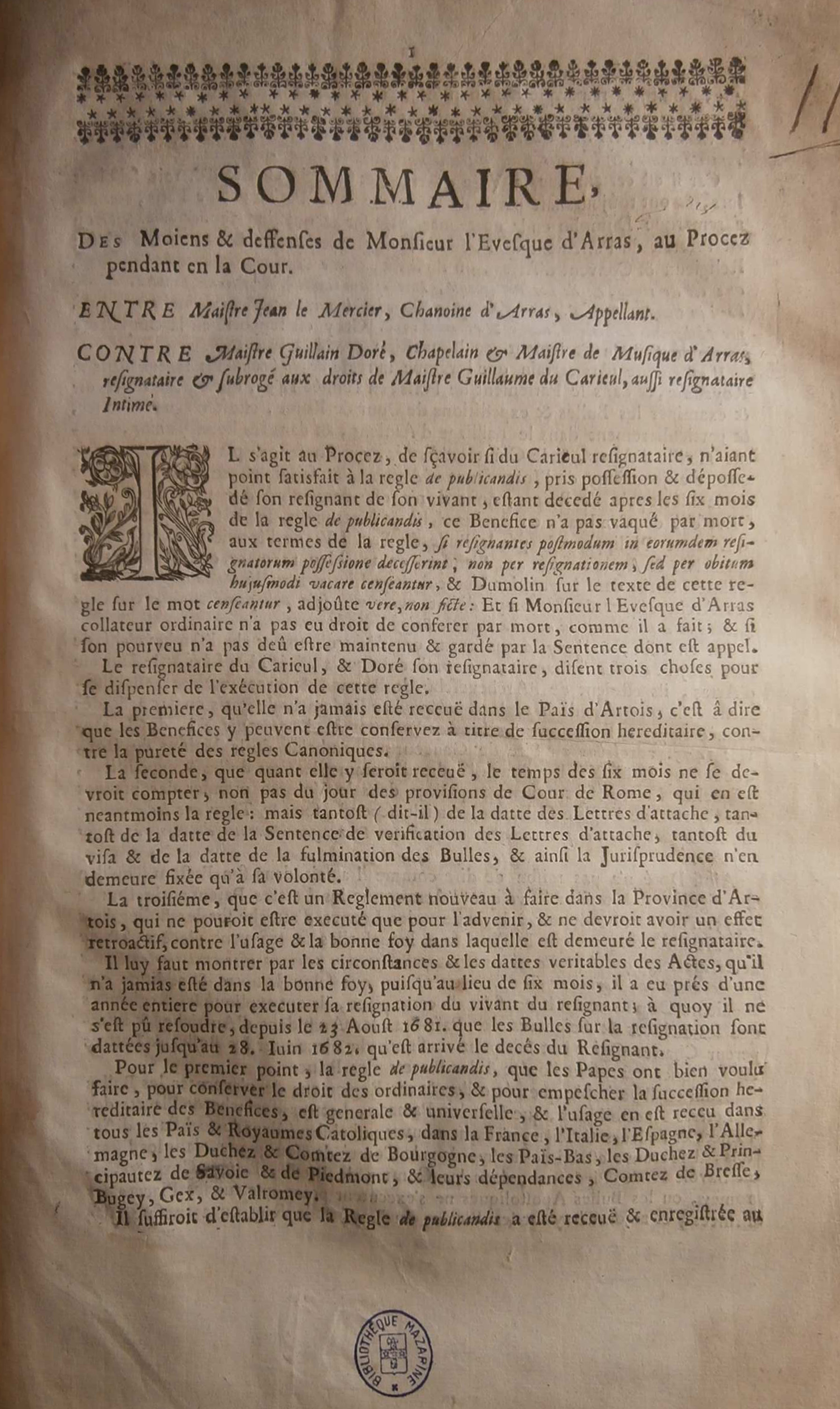 Première page du factum de ca. 1684 qui cite le musicien Ghislain Doré. Paris Bibl. Mzazrine : 2°-7738-11.